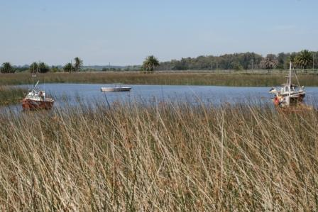 Acceso a los humedales del Santa Lucía.